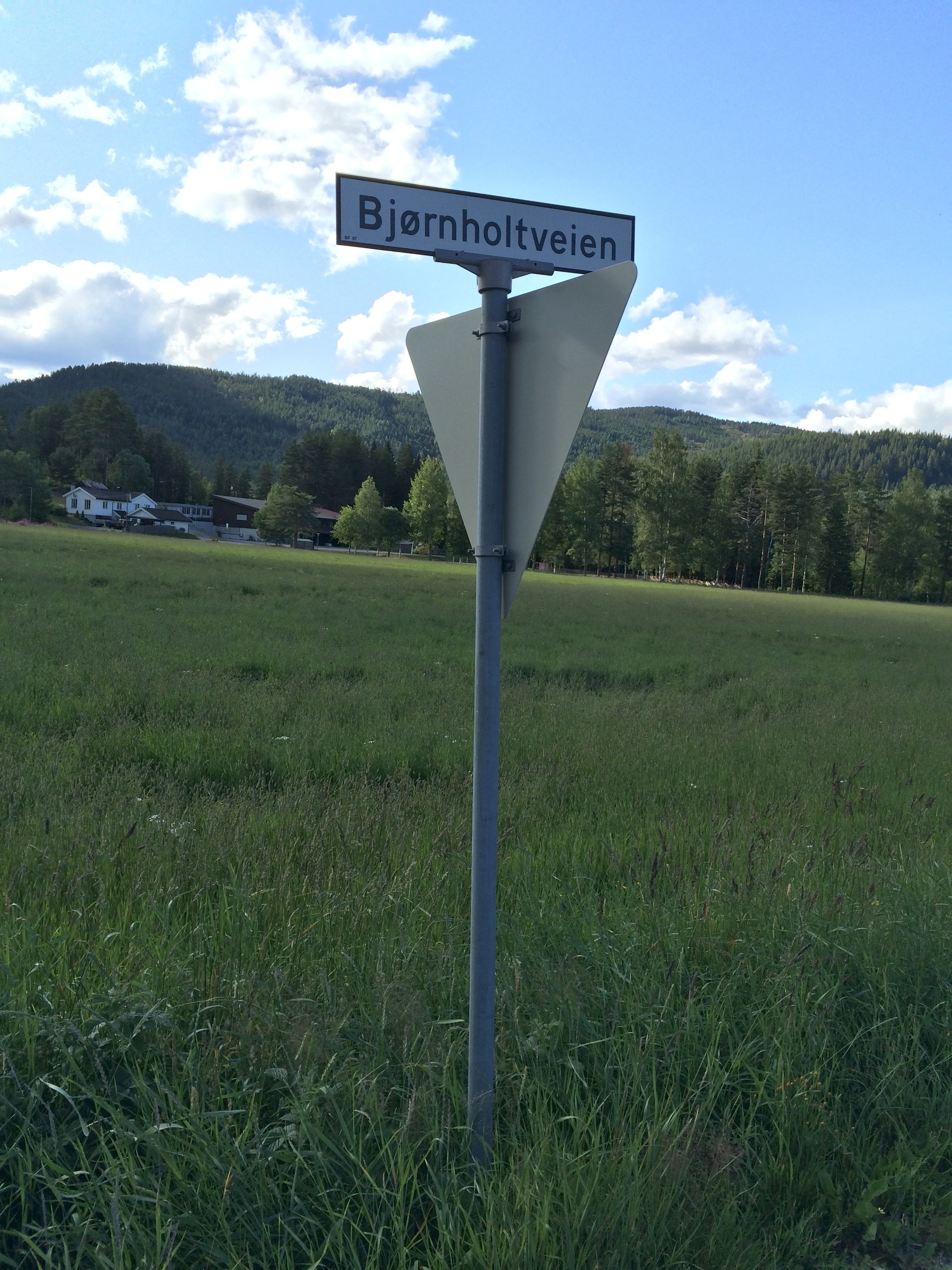 Bjørnholtveien i Jondalen i Kongsberg kommune. Ved avkjøringen fra Fylkesvei 37.